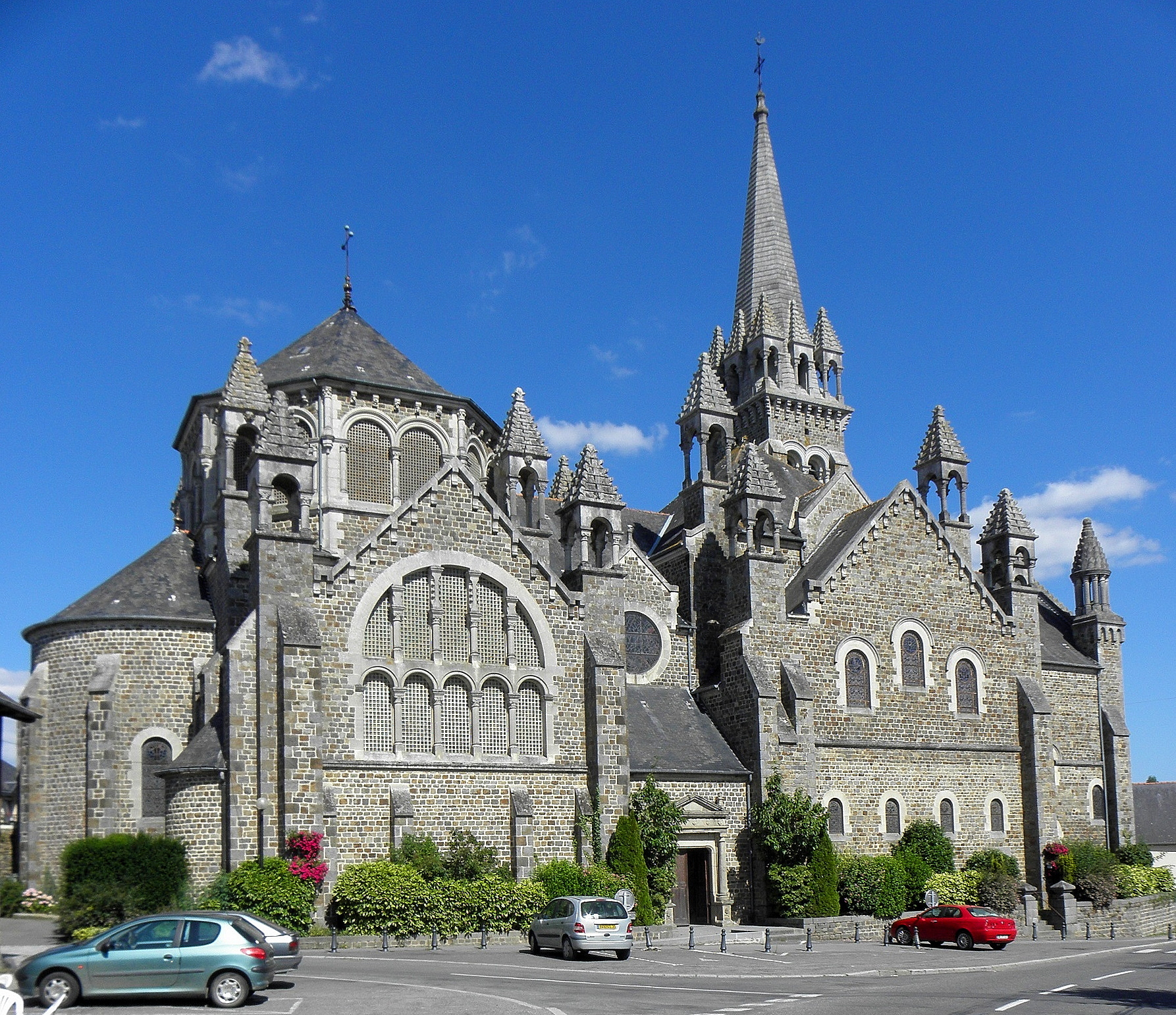 Église Sainte-Trinité de Tinténiac (35).